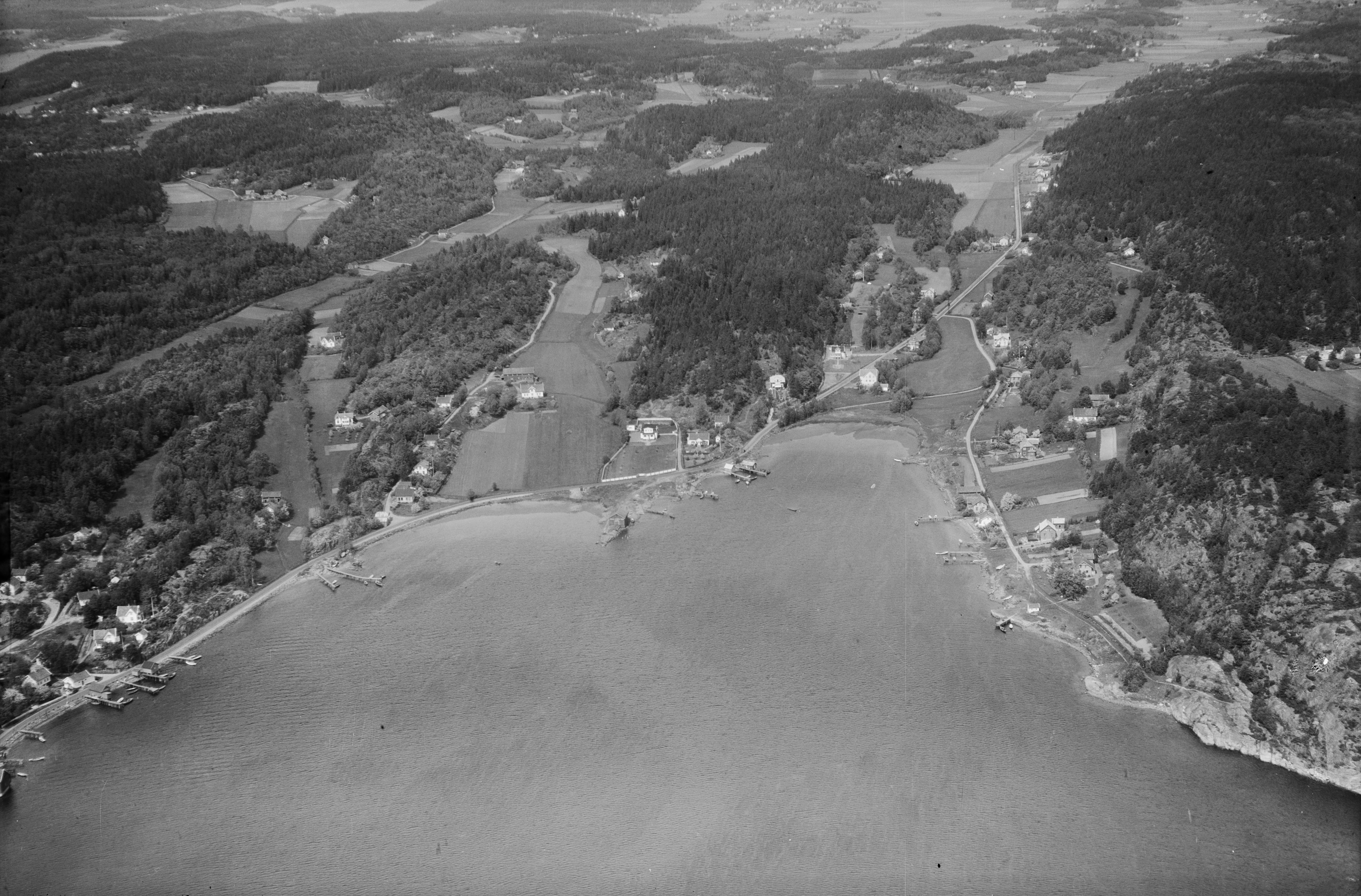 WF.S.7870